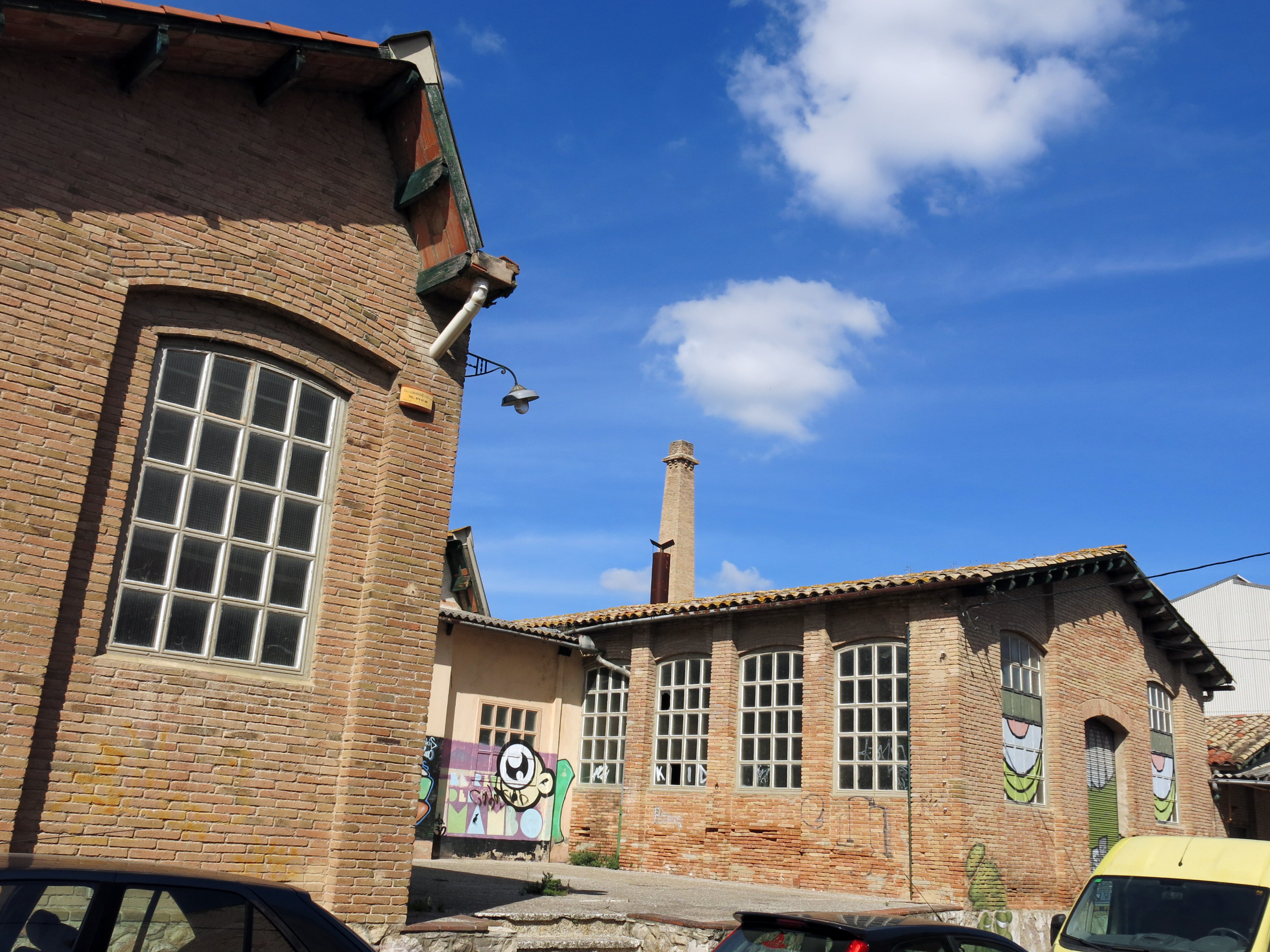 Antiga fàbrica tèxtil Cetriko, al c. Sant Martí (Centelles)